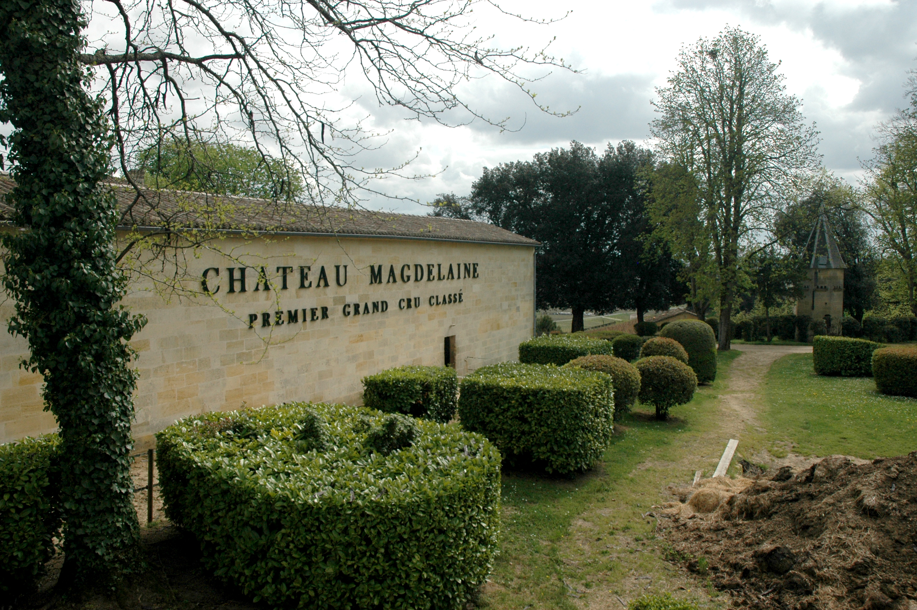 Château Magdelaine en avril 2006